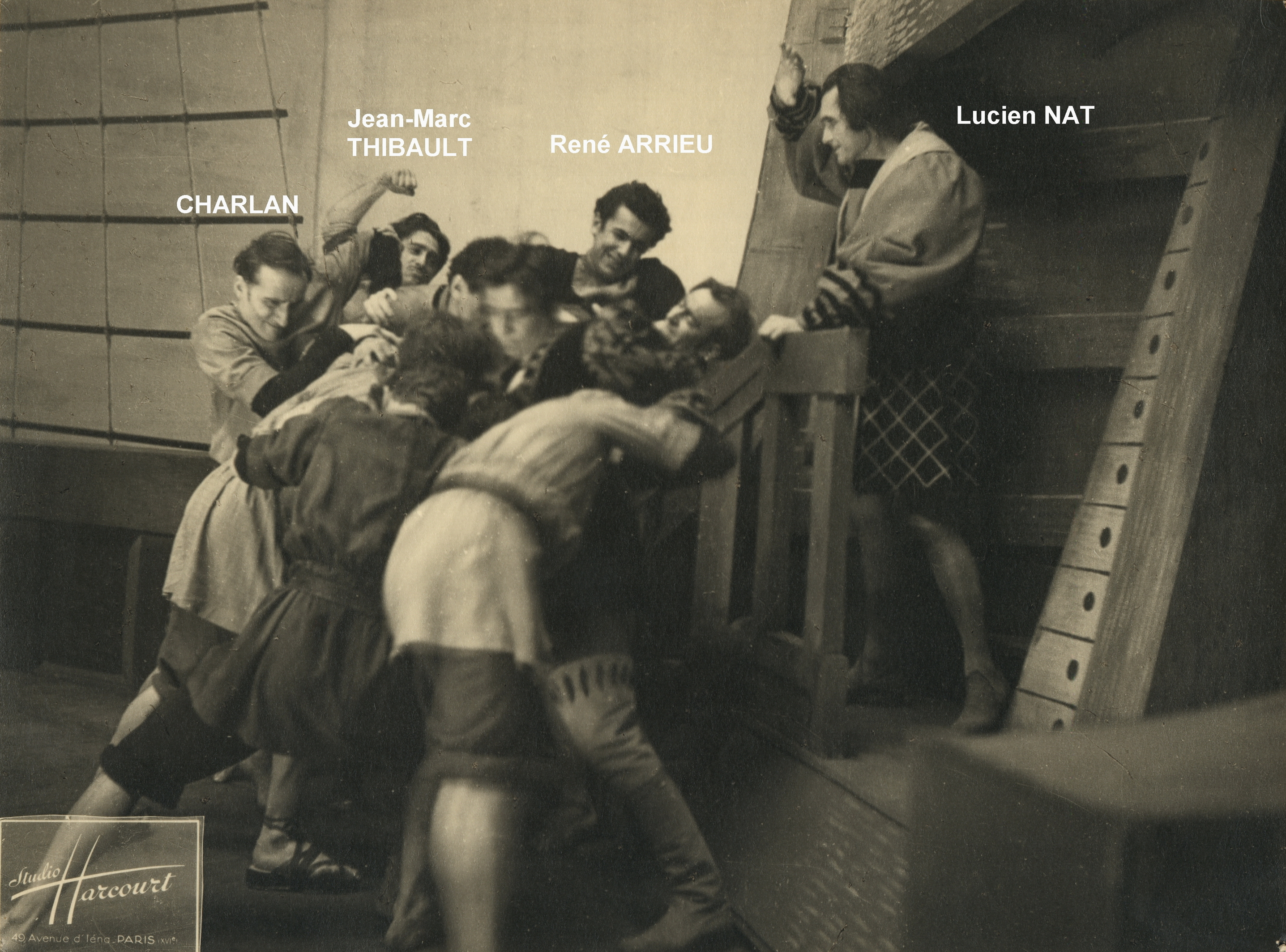 1943-05 Théâtre Montparnasse - Scène de "Cristobal" avec Charlan, Jean-Marc Thibault, René Arrieu et Lucien Nat